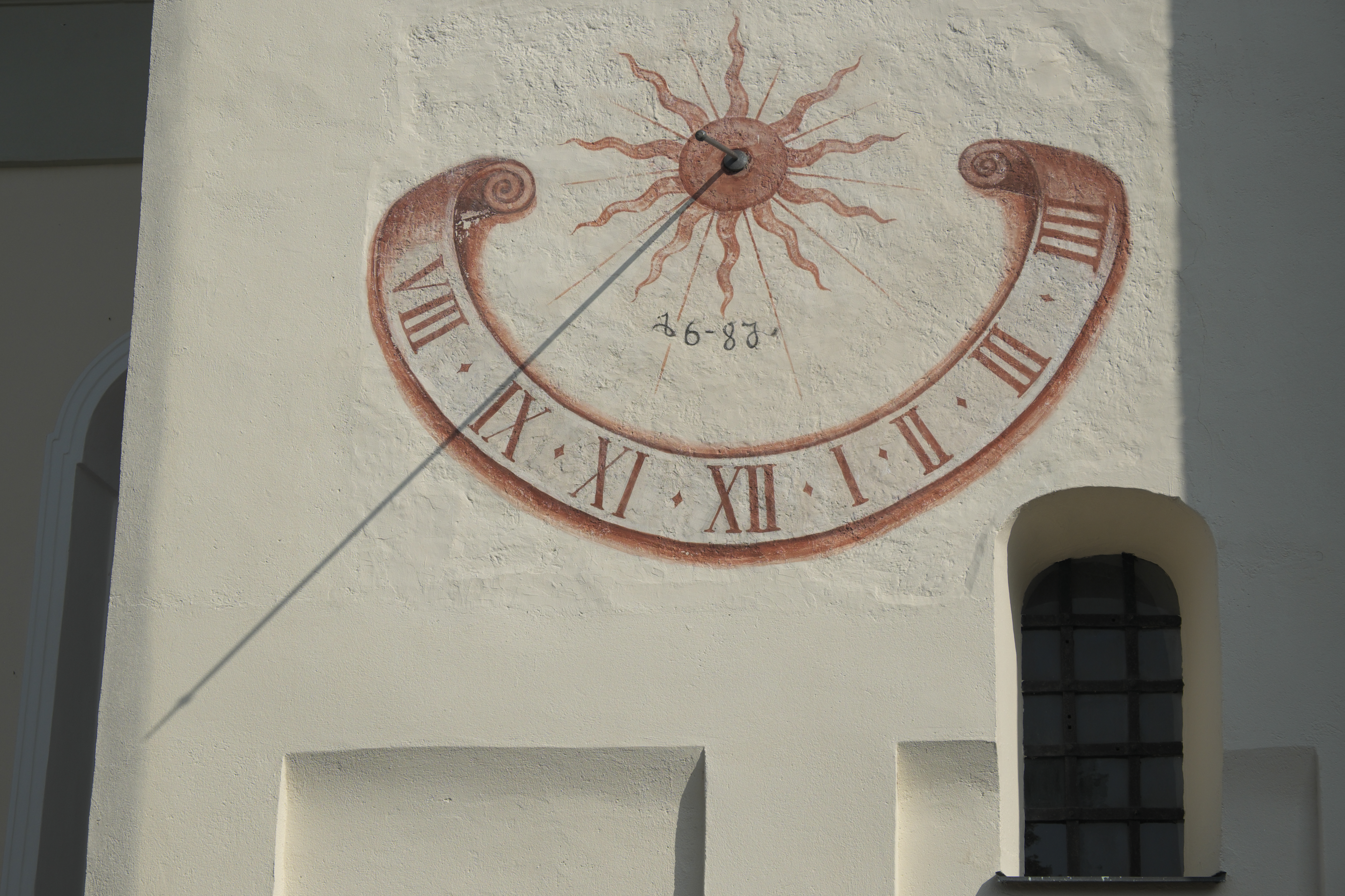 Katholische Pfarrkirche St. Michael in Reichenkirchen (Fraunberg) im Landkreis Erding (Bayern/Deutschland), Sonnenuhr